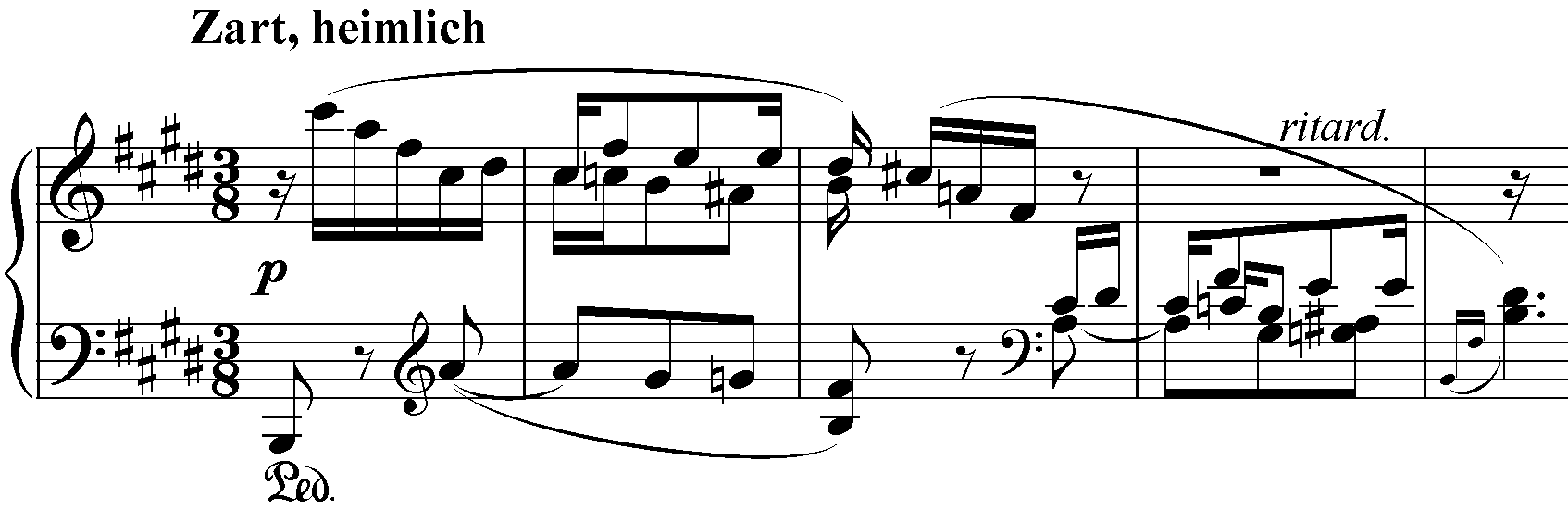 Beginning of Robert Schumann's Song "Mondnacht" (from Liederkreis op. 39)